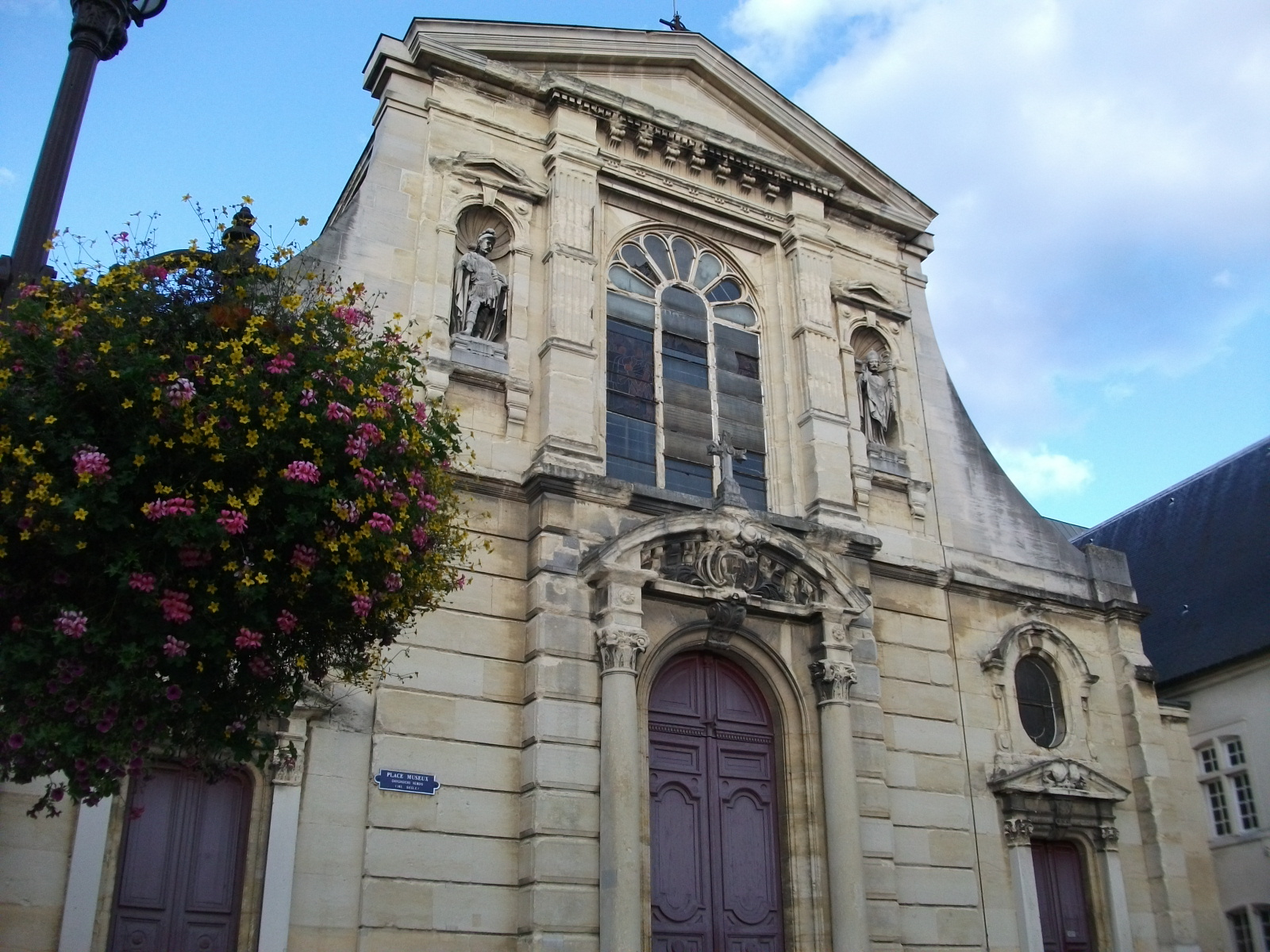 façade de l'église St-Maurice de Reims depuis la place Museux.